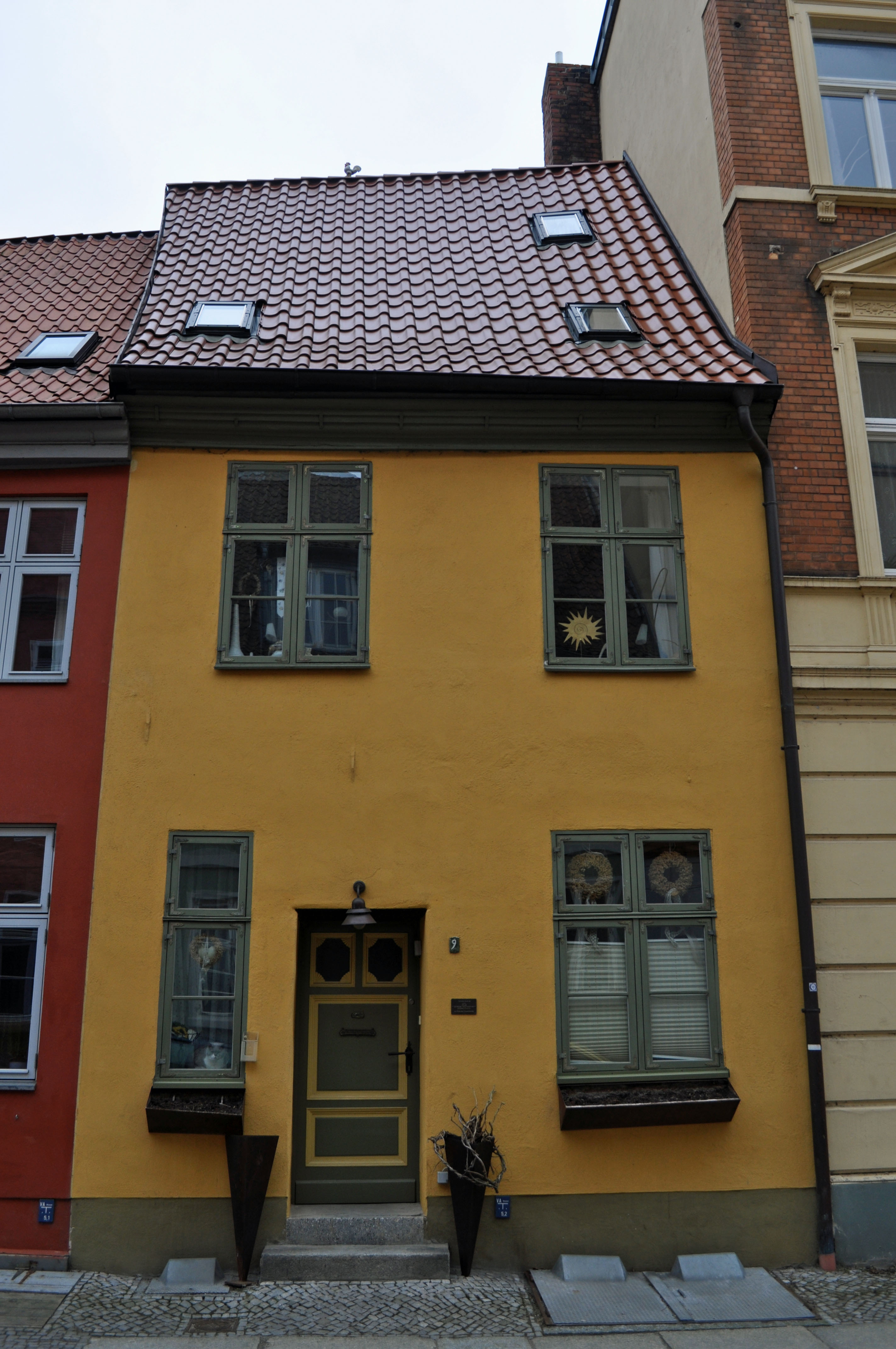 Gebäude bzw. Gebäudedetail in Stralsund. Straße und Hausnummer siehe Dateiname.